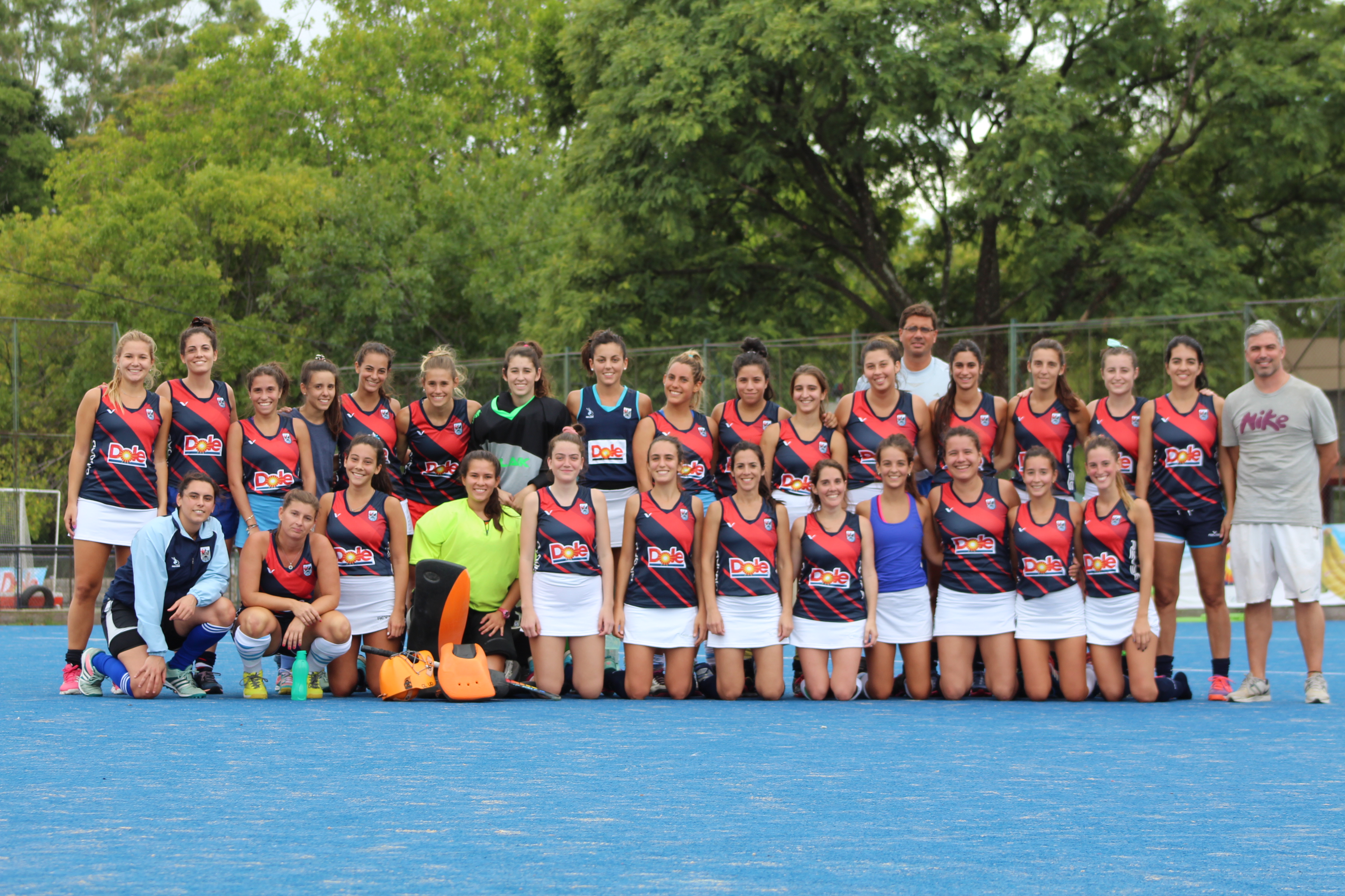 Ciudad C 2017